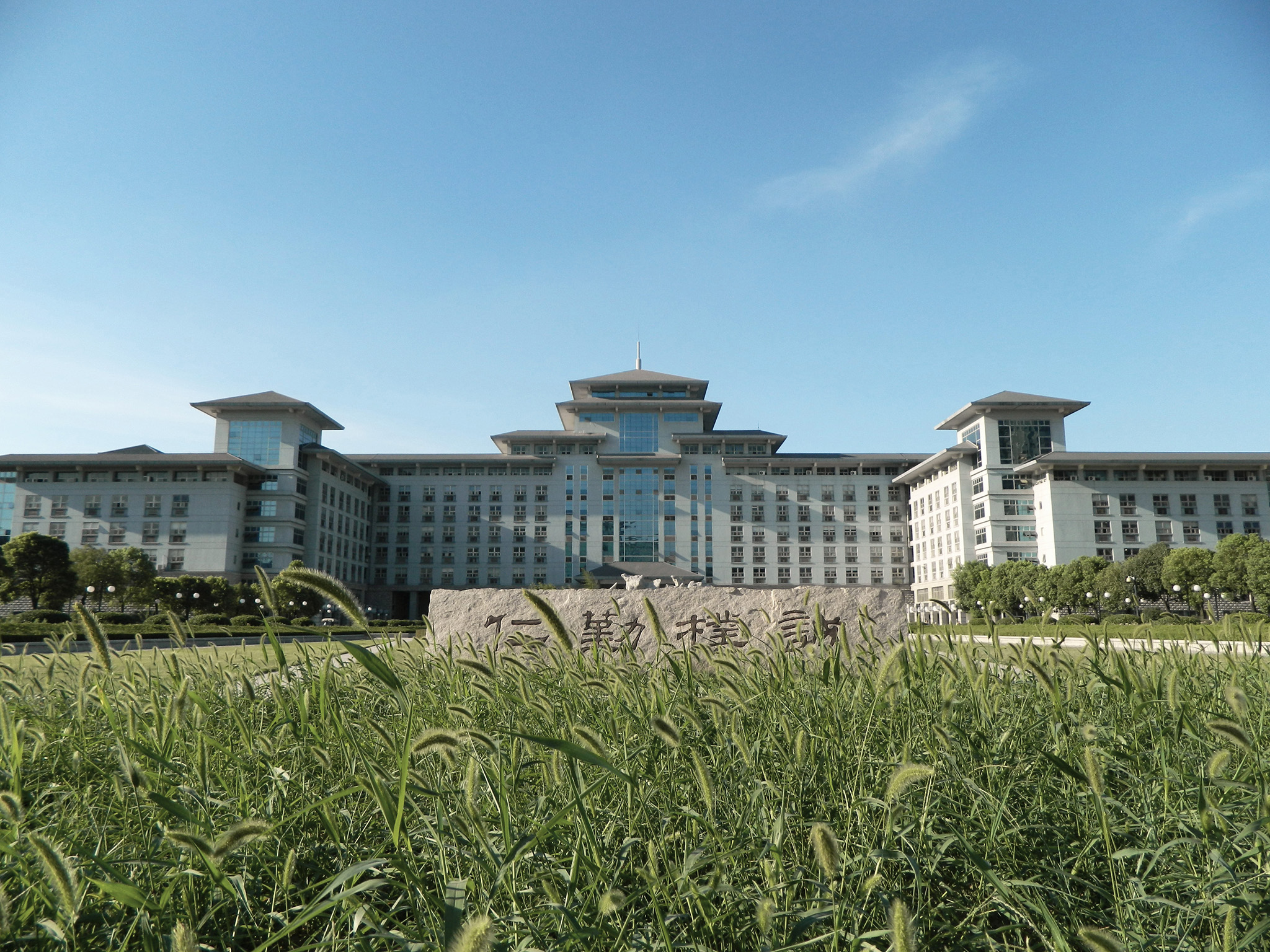 南京农业大学逸夫楼